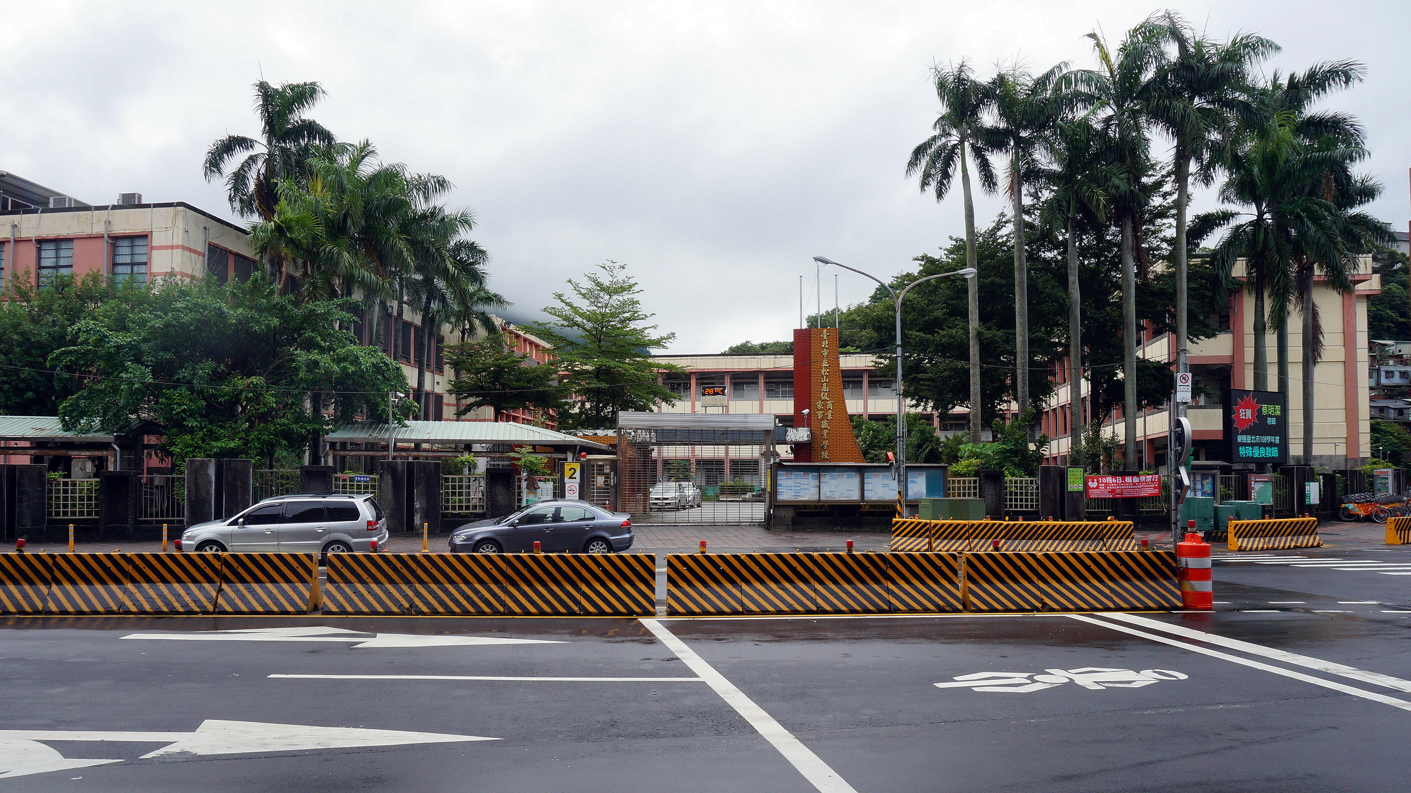 臺北市立松山高級商業家事職業學校大門。